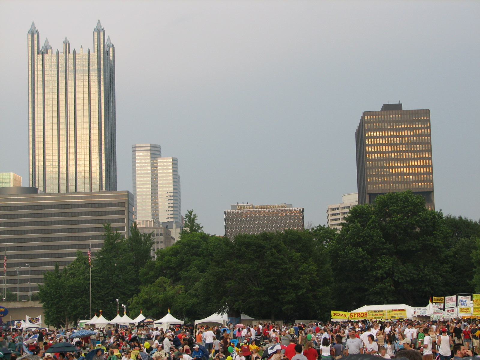 pittsburgh regatta